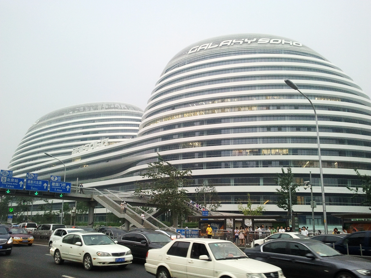 银河SOHO